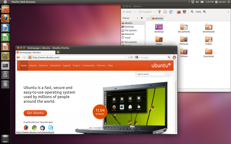 Basa Sunda: ieu nyaeta screenshoot Ubuntu 11.04